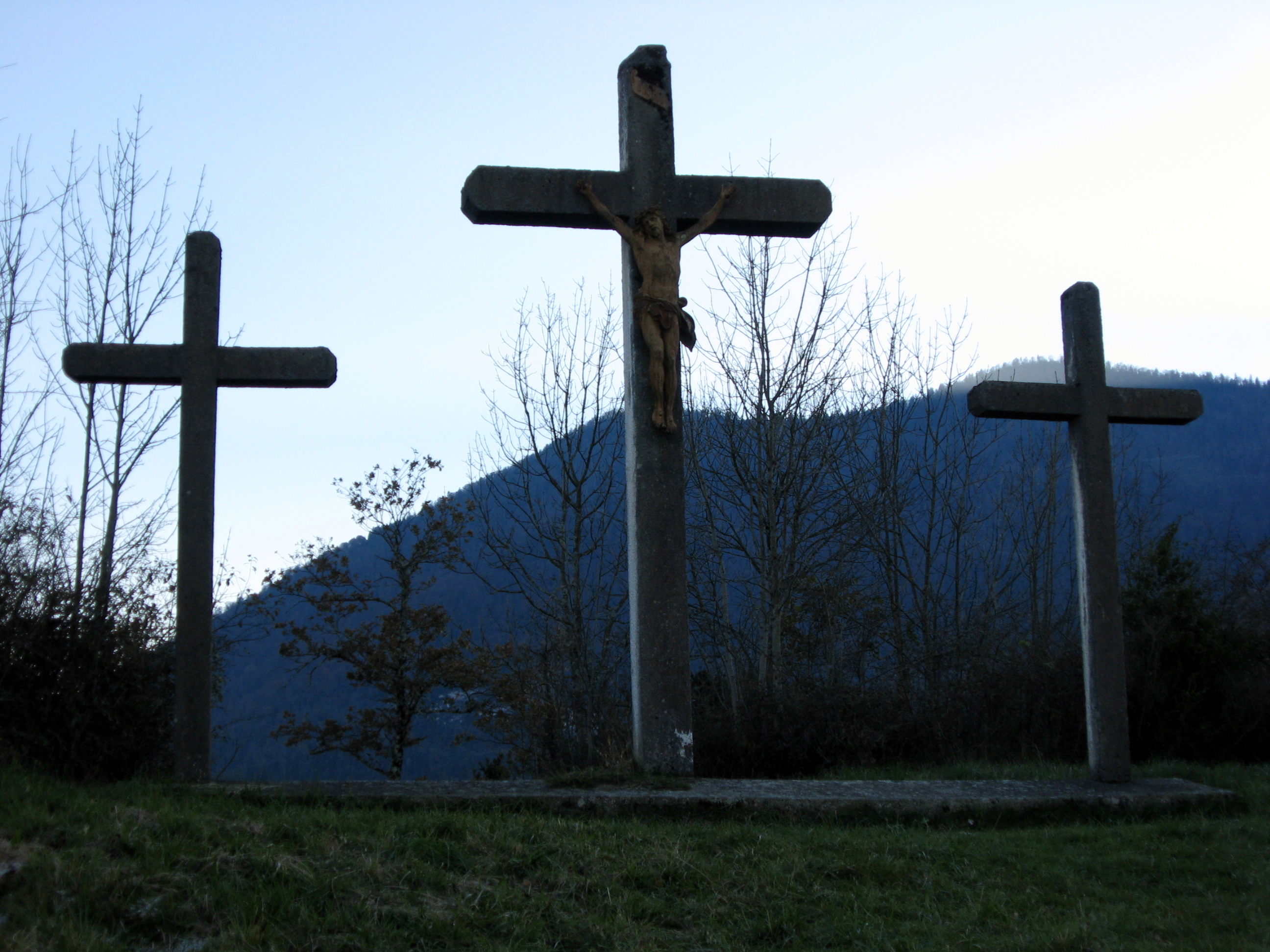 Croix dédiées à l'archange Saint Michel (Pyrénées-Atlantiques) (Pyrénées).